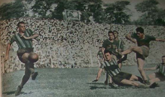 Partido del 5 de abril de 1953, Rosario Central 0-Boca Juniors 0. Alfredo Fógel (Rosario Central) neutraliza el remate al arco del delantero Roberto Rolando (Boca Juniors). A los pies de éste último cierra en falso Federico Vairo; detrás de él, de pie y con la camiseta de Boca, se encuentra su hermano Juan Vairo.